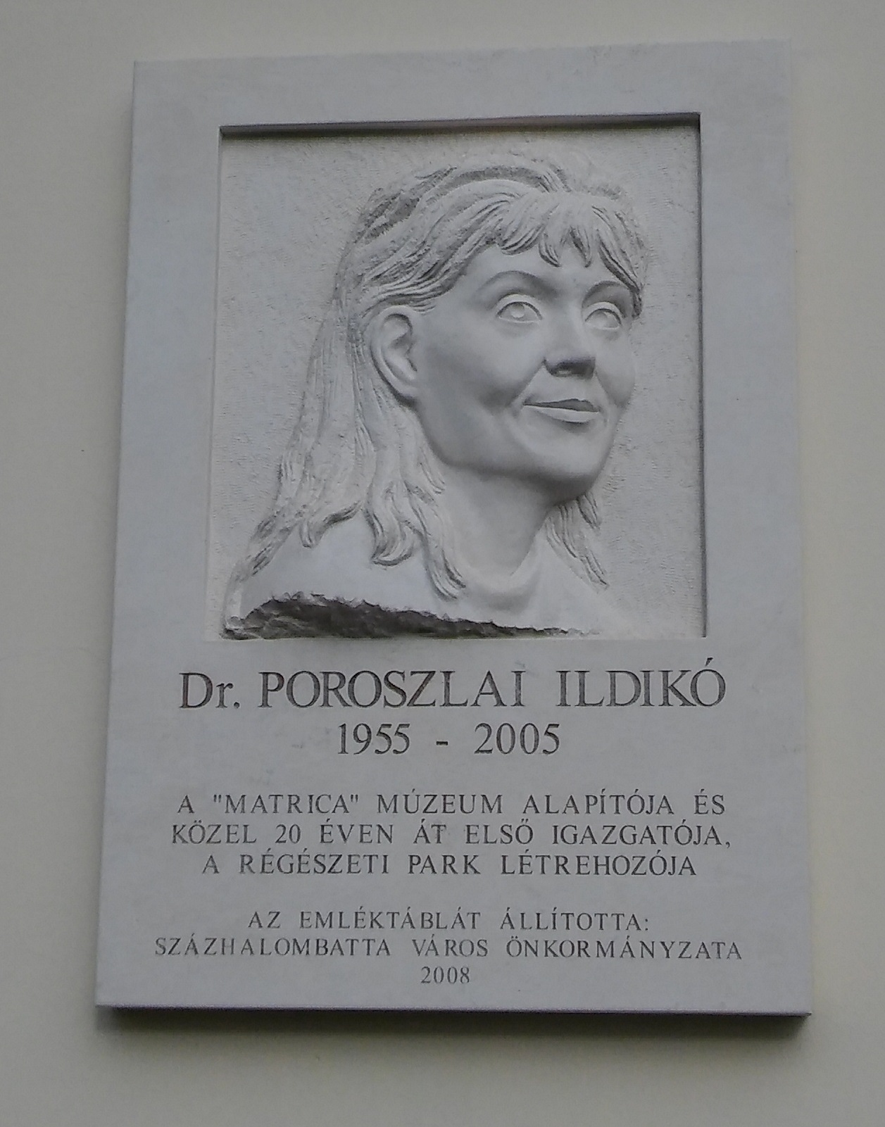 Poroszlai Ildikó régész emléktáblája az általa alapított Matrica Múzeum utcára néző falán.